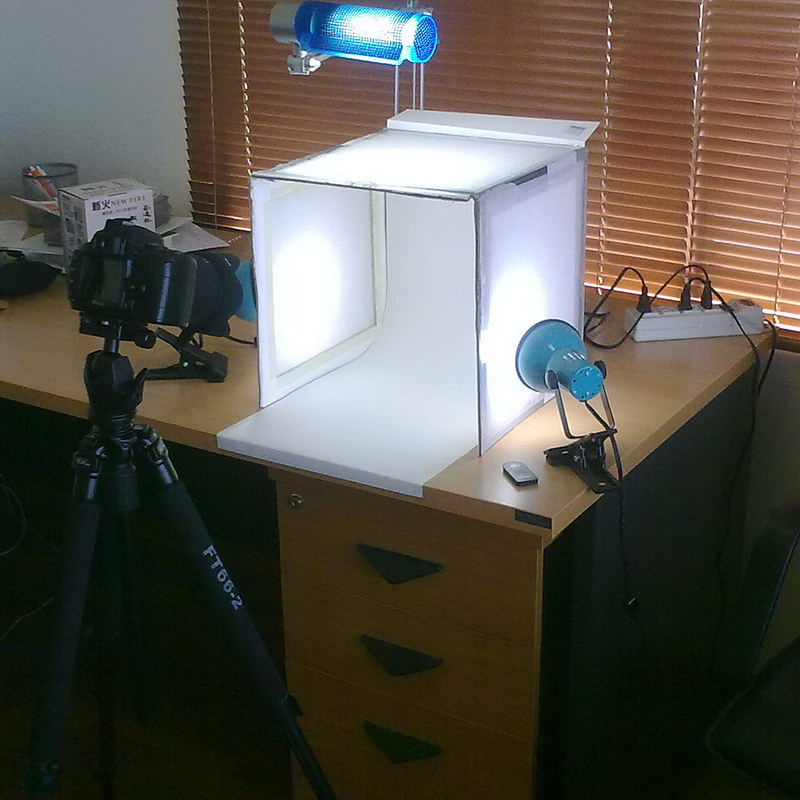 My current setup